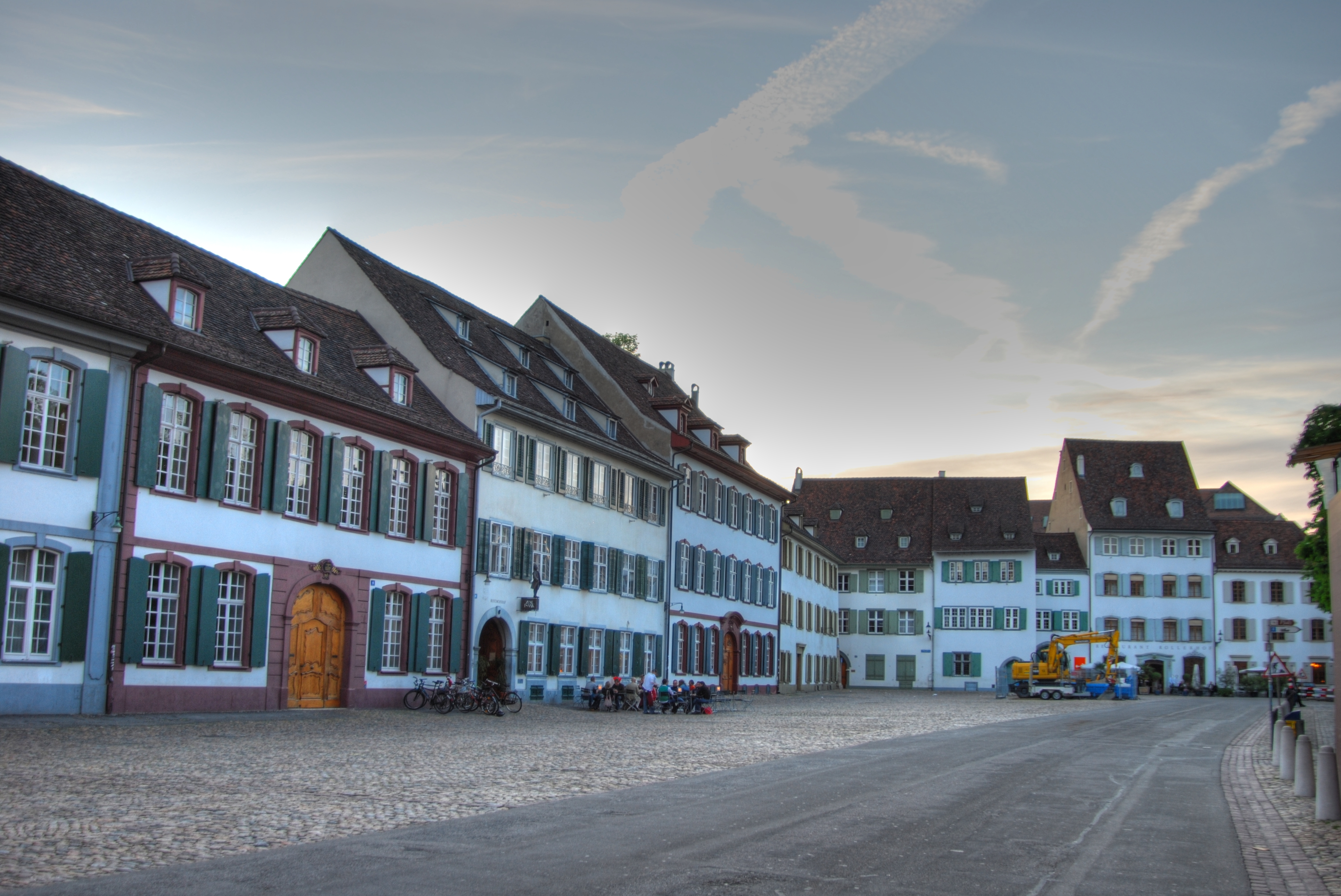 Münsterplatz, Basel, Switzerland